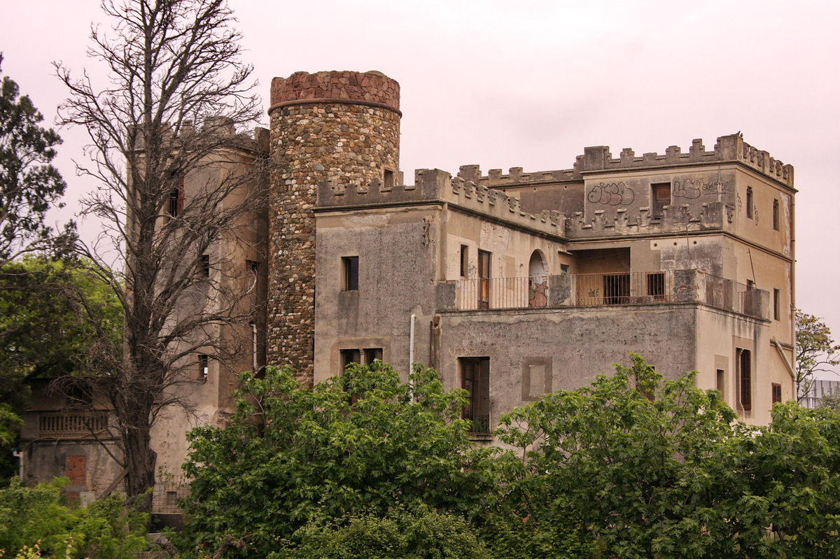 Torre Can Felip a Sant Joan Despí (Baix Llobregat, Catalunya). La torre cilíndrica és romànica S.XII i es troba en bon estat. La casa que l'envolta és historicista S. XIX i esta en ruïnes.